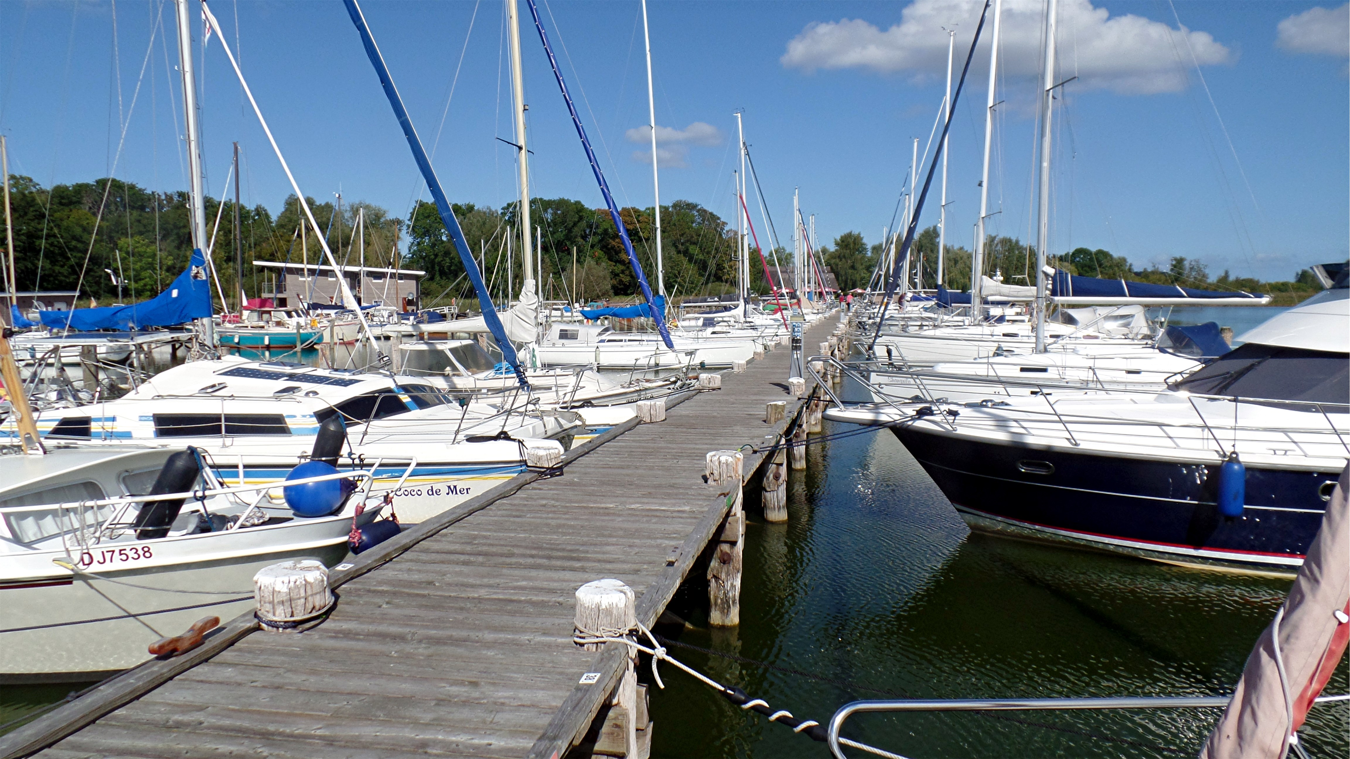 Boote im Krumminer Naturhafen